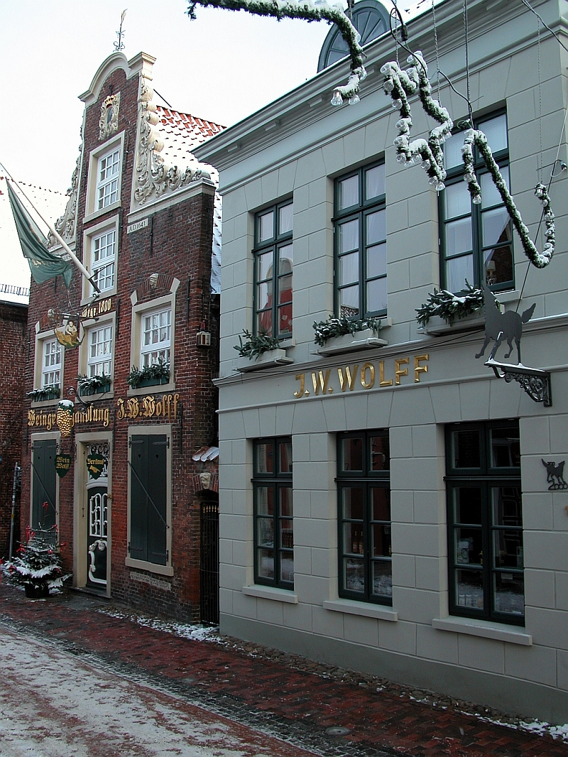 Leer: Haus Samson (links) mit Weinhandlung Wolff.